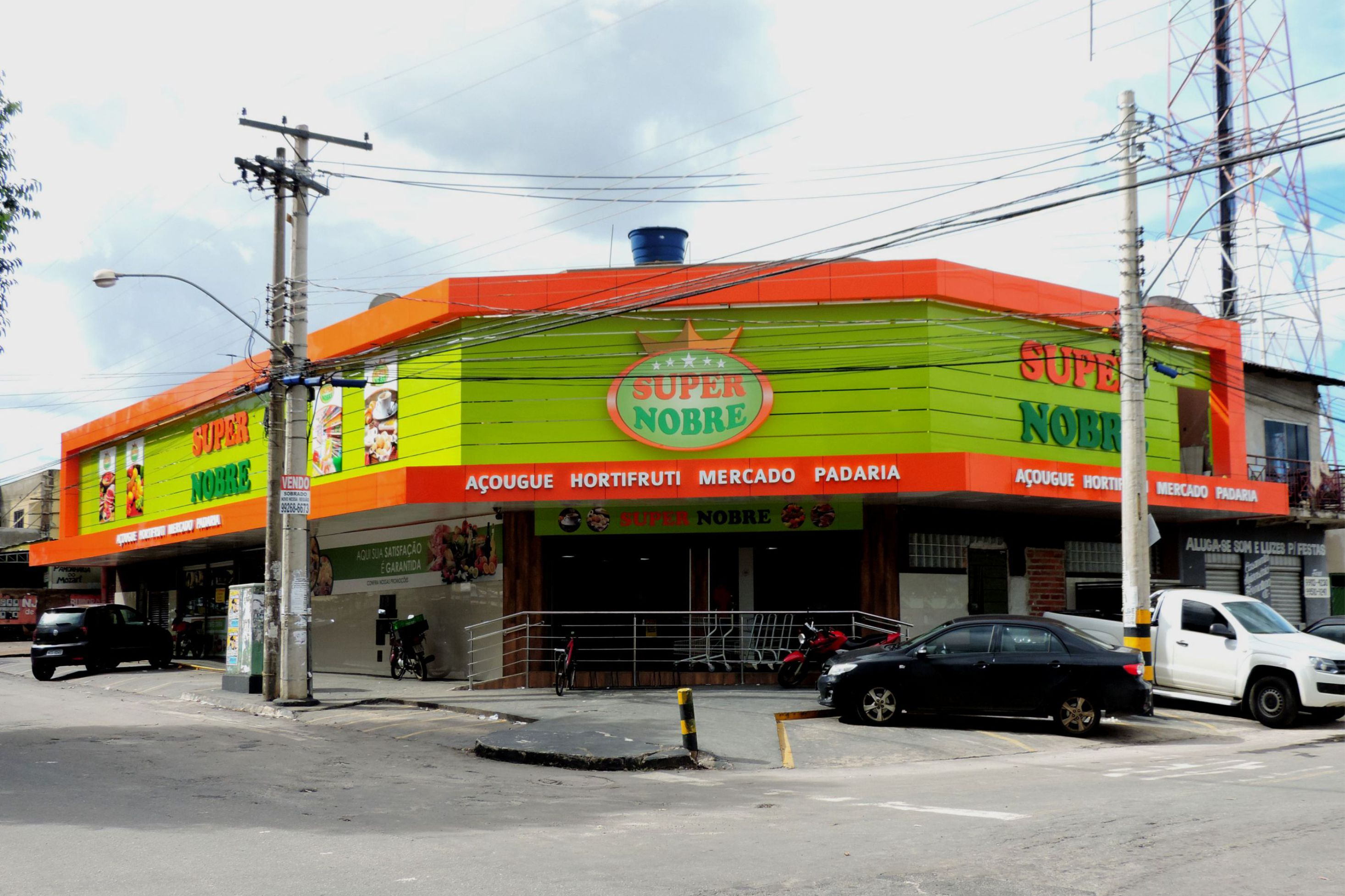 Fachada em ACM verde e laranja, com letras caixa e luminosos - feita pela empresa FGL Comunicação Visual em Aparecida de Goiânia - GO